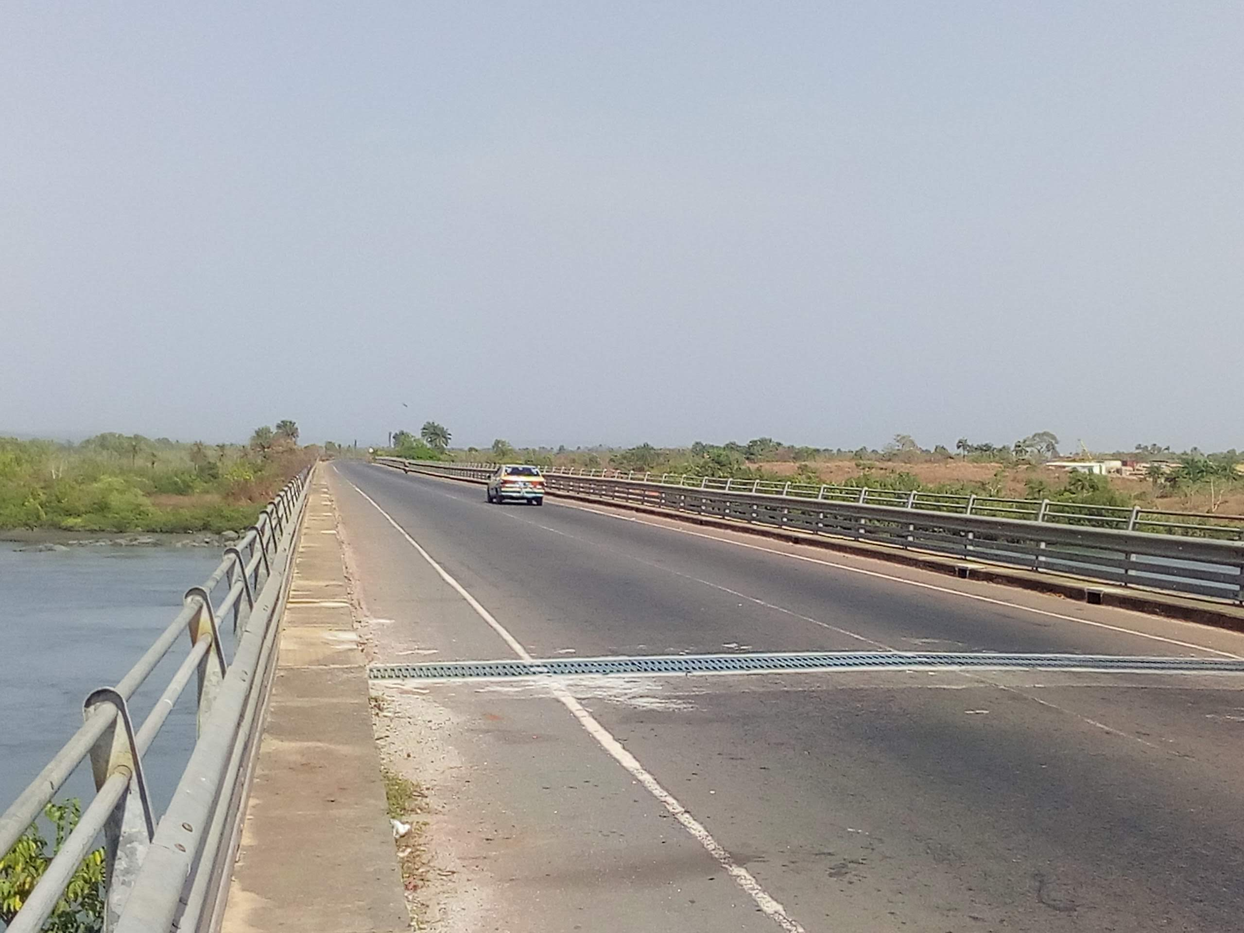 Pont sur la fatala This is an image with the theme "Africa on the Move or Transport" from: Guinea